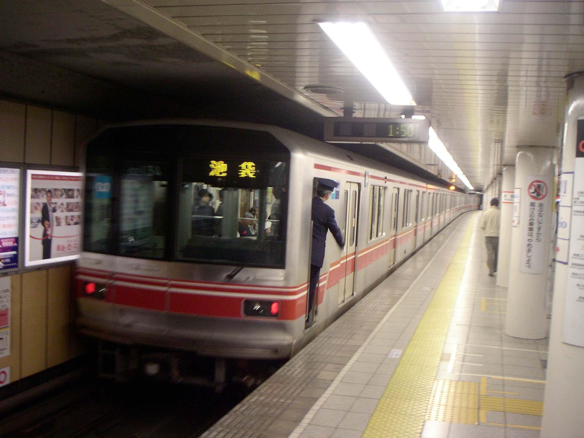 Shinjuku Station, Marunouchi Line